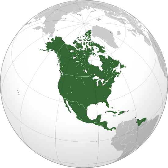 CONCACAF orthographic projection Mapa CONCACAF